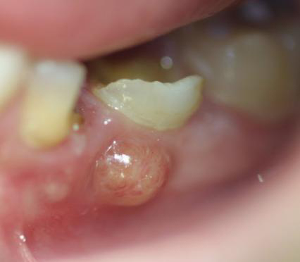 abcès parulique